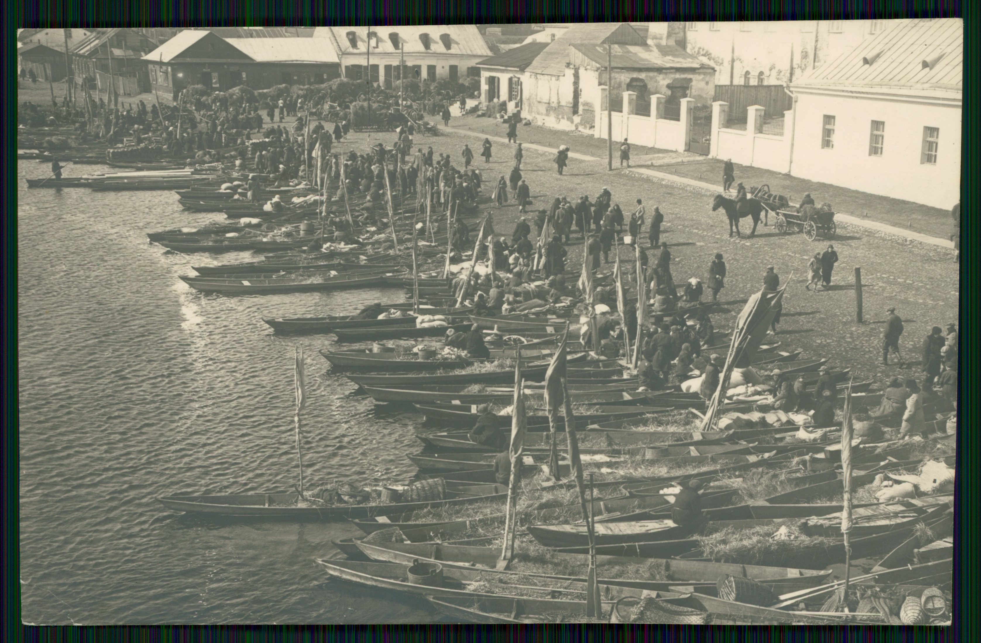 Беларуская (тарашкевіца): Пінск (Pinsk), рог вуліцы Набярэжная (vulica Nabiarežnaja) і пляцу Рынку (plac Rynak). Касьцёл Сьвятога Станіслава і калегіюм езуітаў